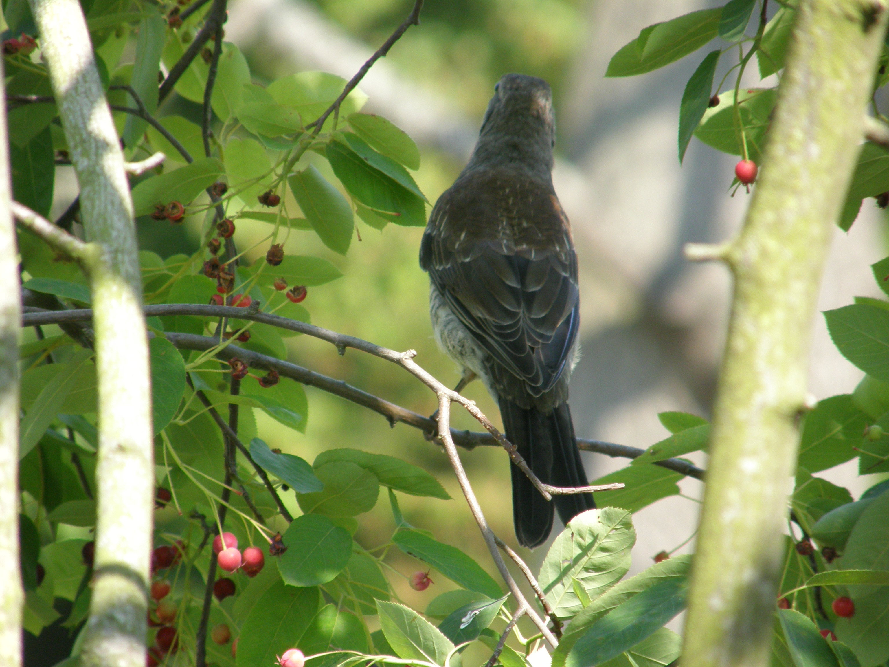 fotografada num jardim de Gotemburgo